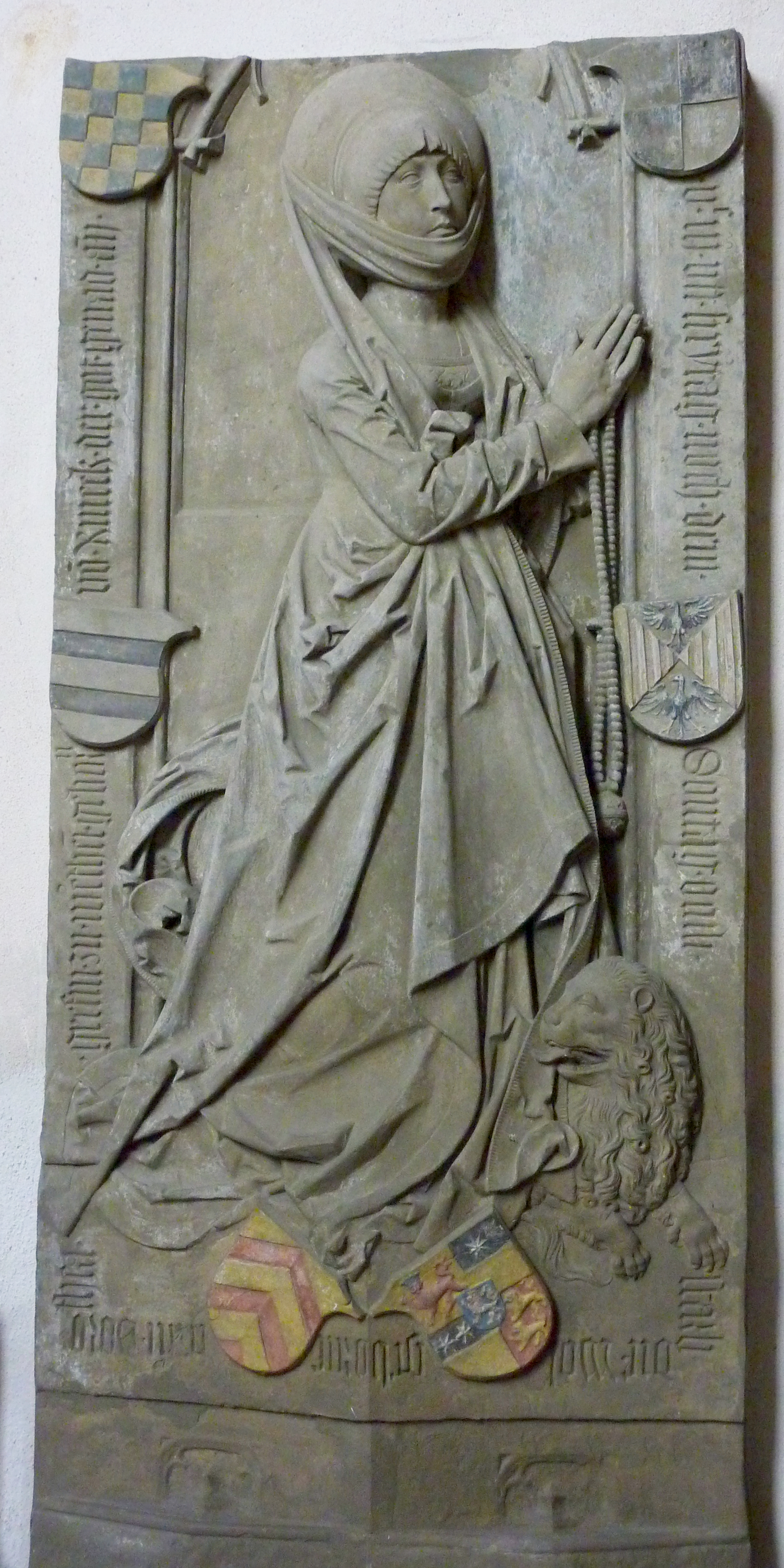 katholische Stadtpfarrkirche St. Peter und Paul in Grünsfeld im Main-Tauber-Kreis (Baden-Württemberg), Hauptstraße 18, Epitaph für Dorothea von Rieneck